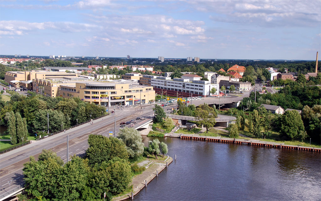 Blick auf den Potsdamer Hauptbahnhof aus der Luft.